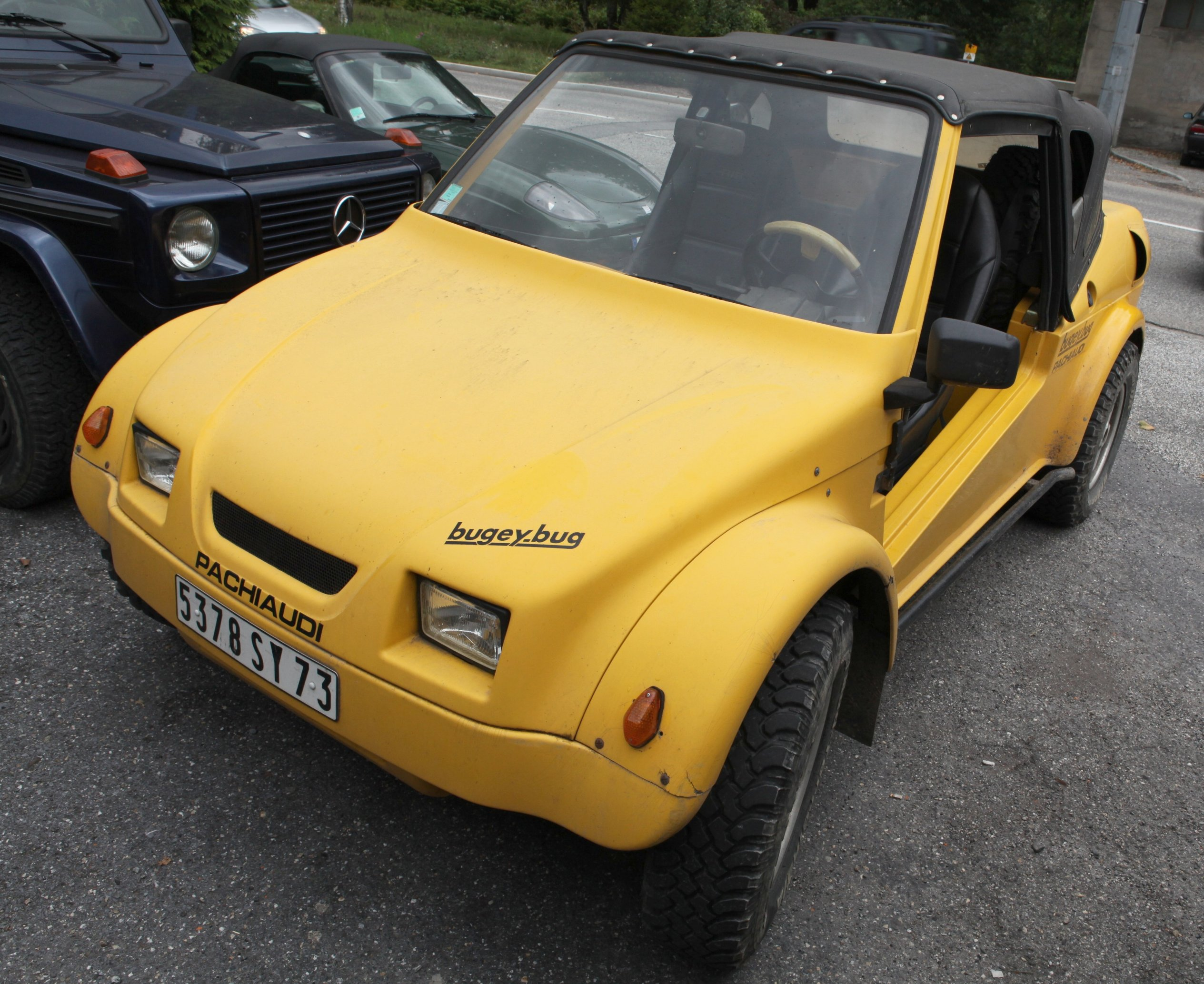 Pachiaudi Bugey Bug